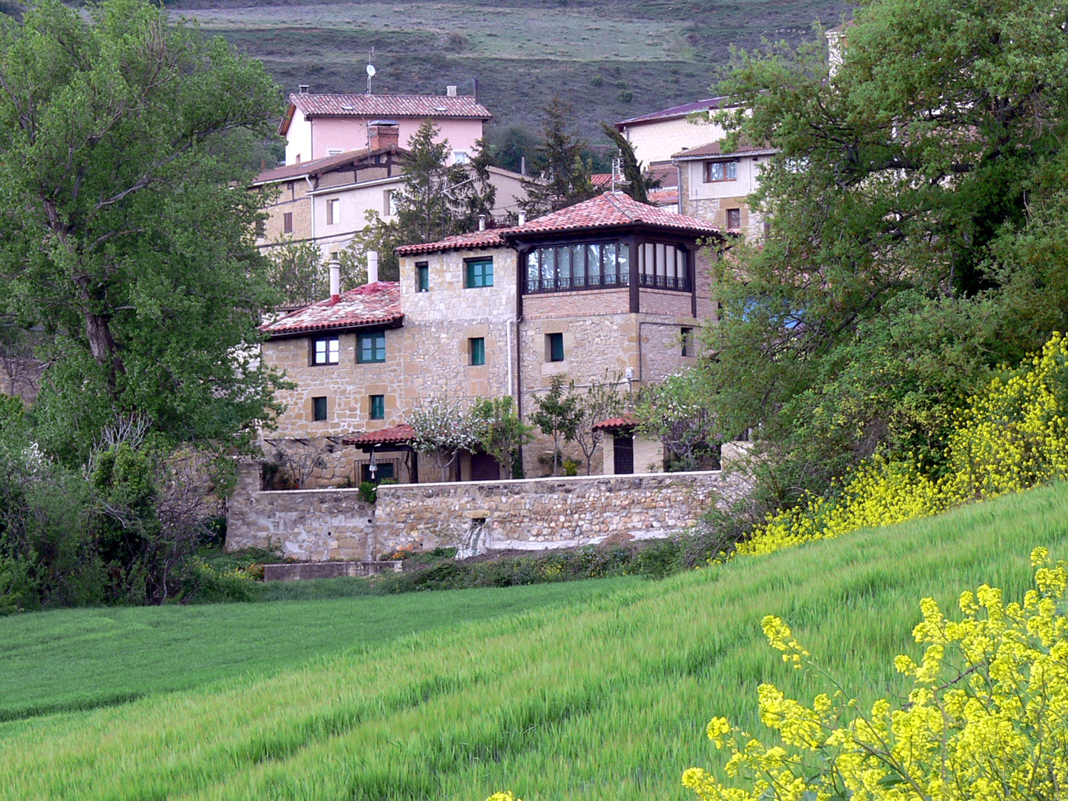 Galbárruli, La Rioja - España.